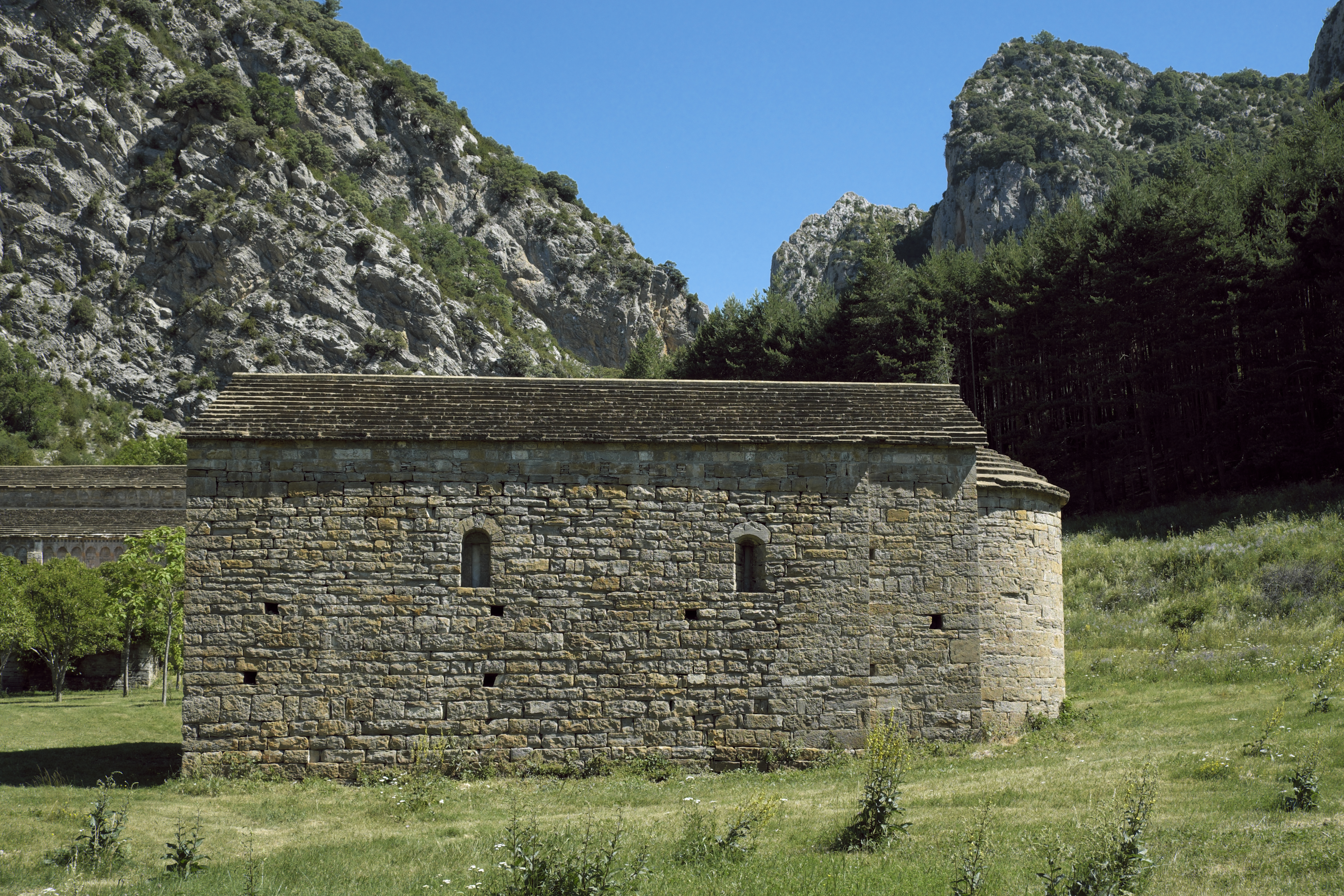 Ermita San Pablo des ehemaligen Benediktinerklosters Santa María de Obarra in Beranuy in der Provinz Huesca (Aragón/Spanien)